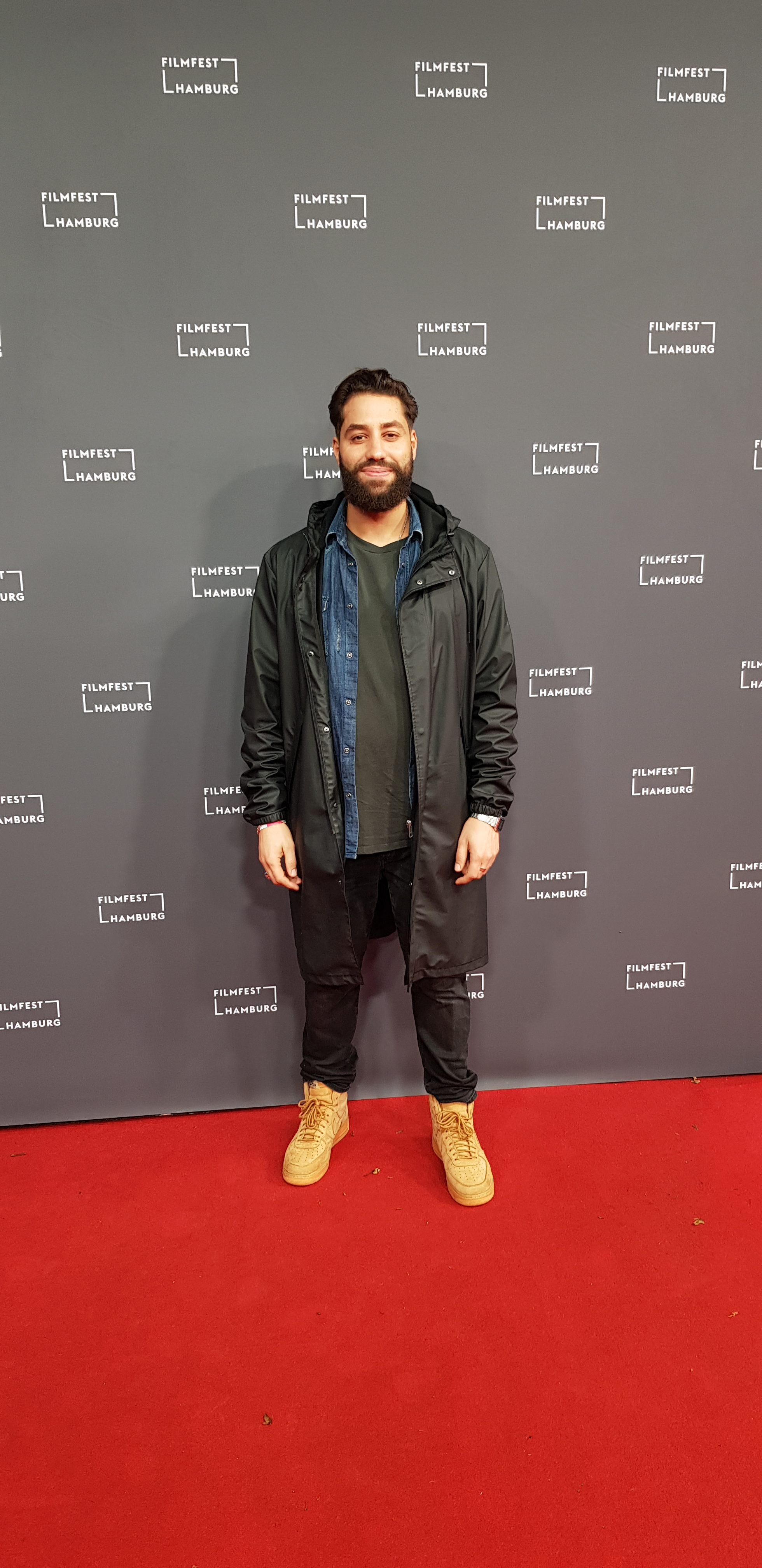 Kais Setti beim Fimlfestival Hamburg